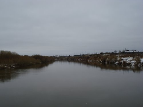 Река Тобол у села Памятное